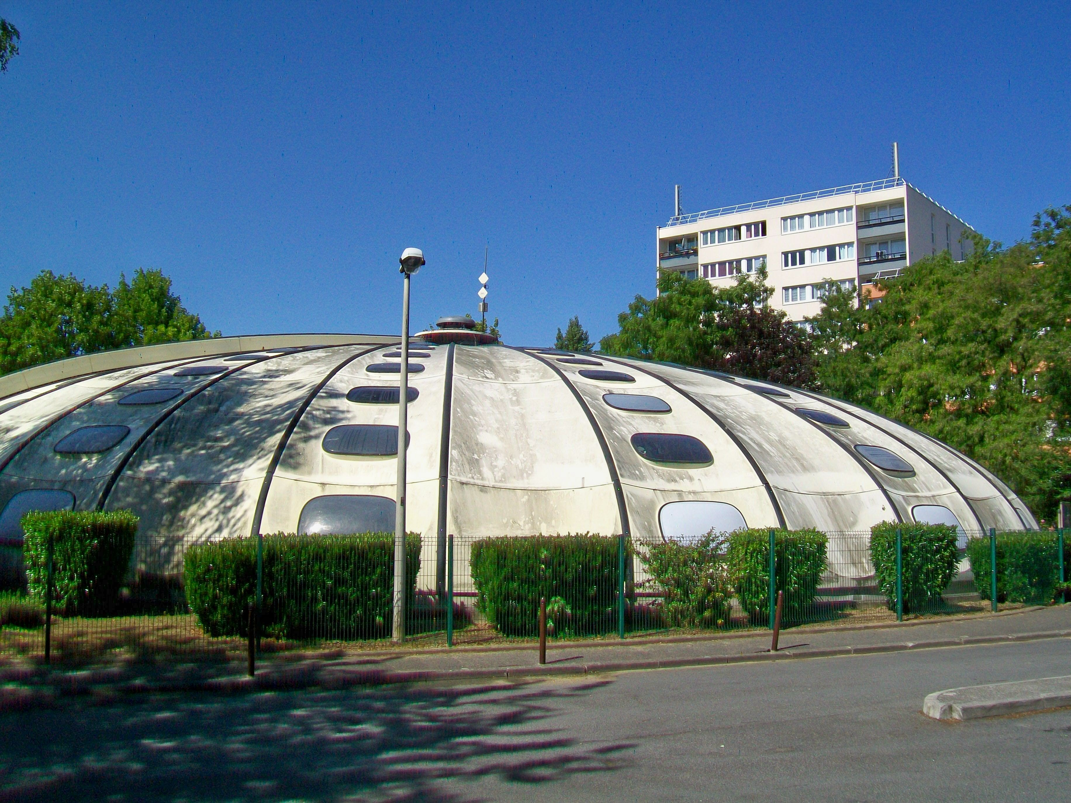 La piscine de Fosses, au quartier du Plateau ; il s'agit d'une piscine Tournesol dont 183 exemplaires existent, construites autour de 1980. Le toit est à moitié ouvrant, pour pouvoir transformer rapidement le bassin en piscine de plein air en été.